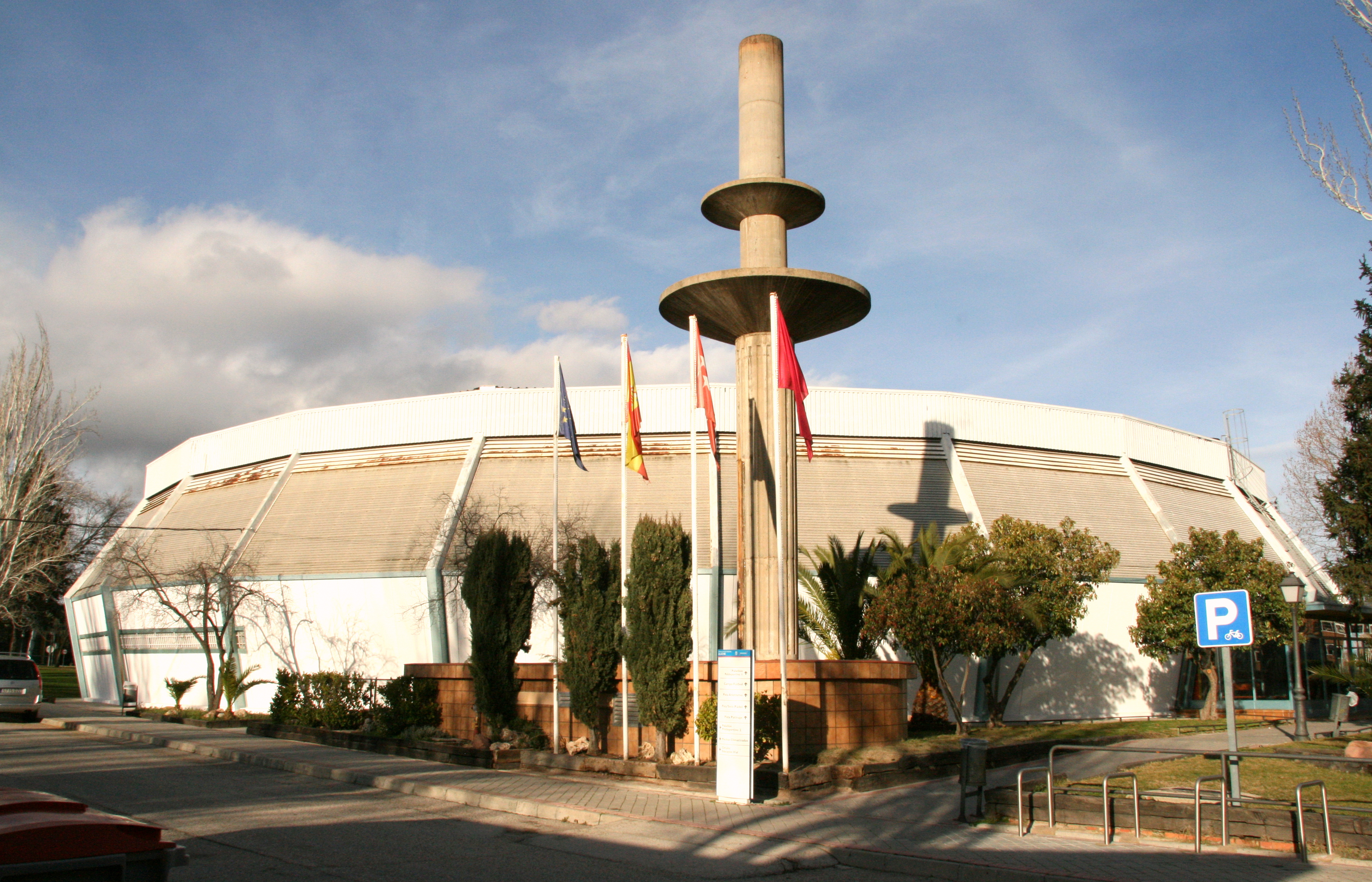 Pabellón cubierto del Polideportivo de Aluche, en el barrio de Las Águilas, distrito de Latina, de Madrid. Es una de las instalaciones más antiguas del polideportivo